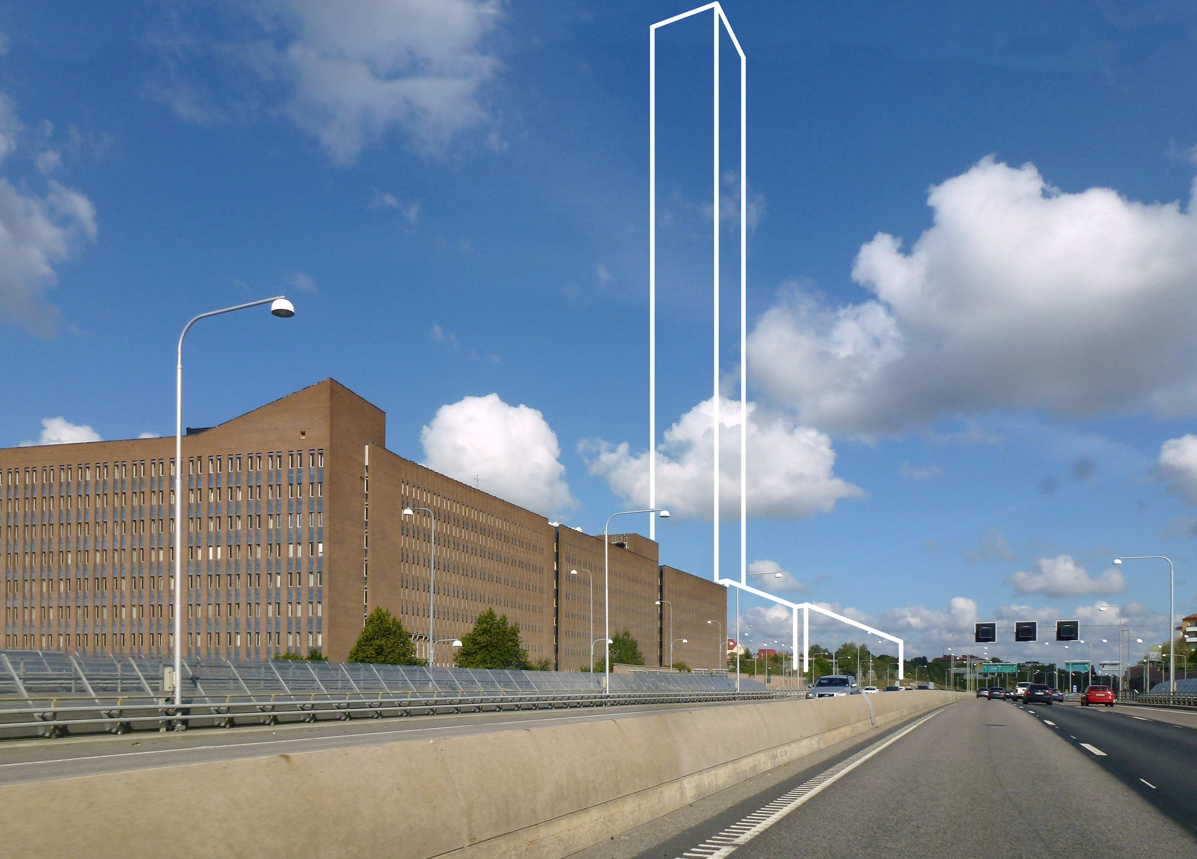 Tellus Tower vy från Södertäljevägen, källa [1]